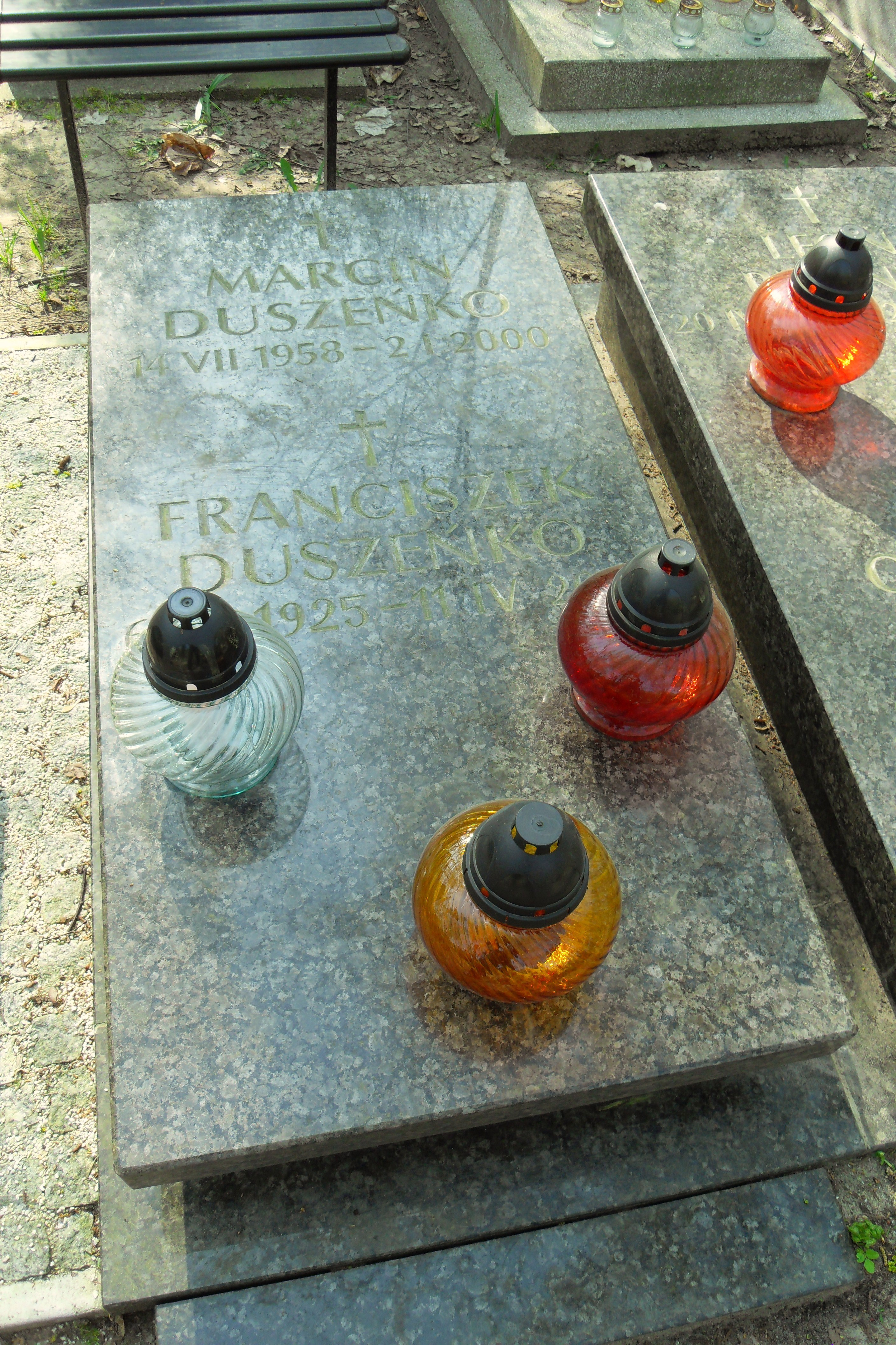 Gdańsk Wrzeszcz. Cmentarz Srebrzysko, grób Marcina Duszeńki i Franciszka Duszeńki.